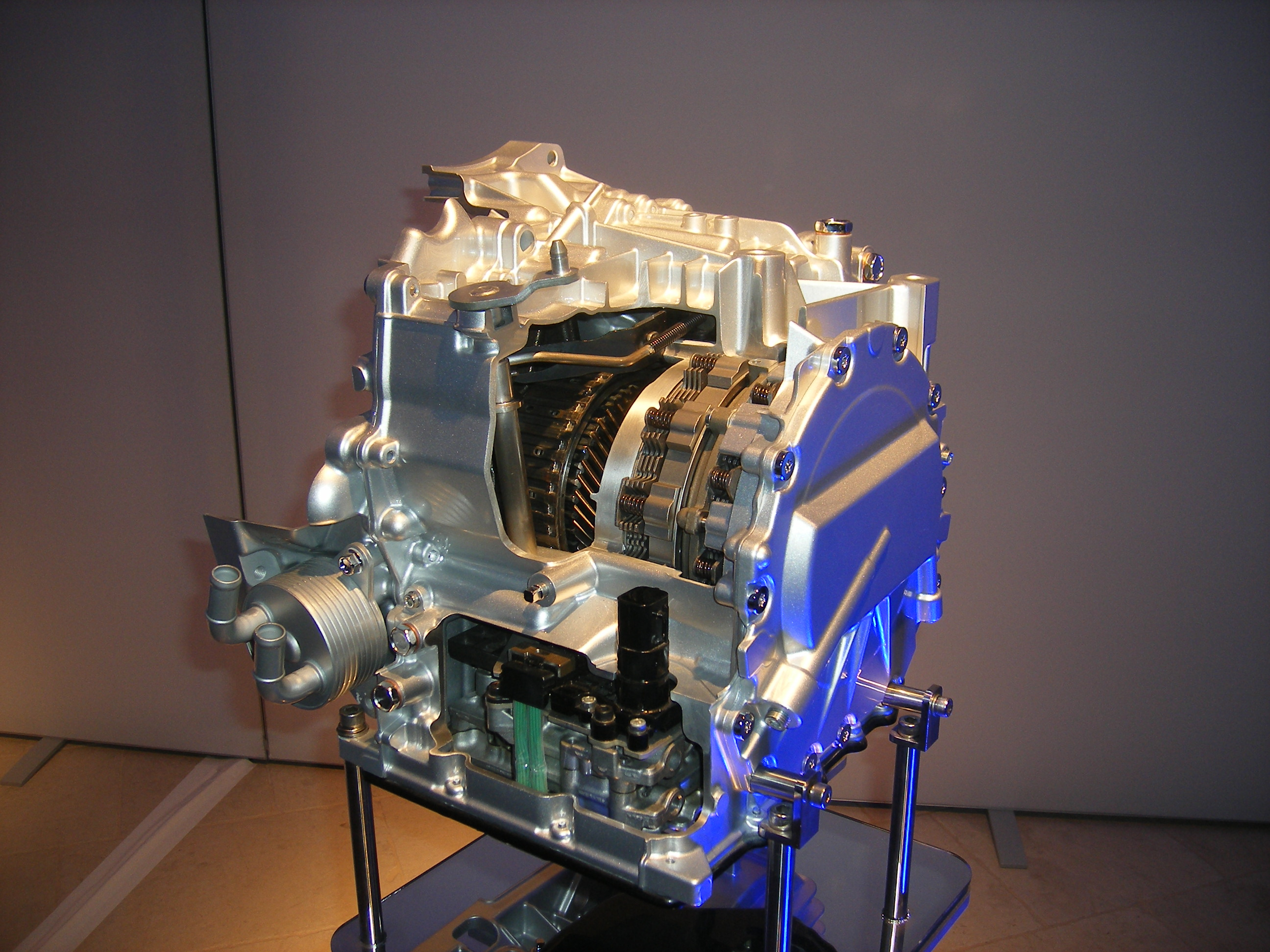 Transmisión automática de seis velocidades Skyactiv-Drive